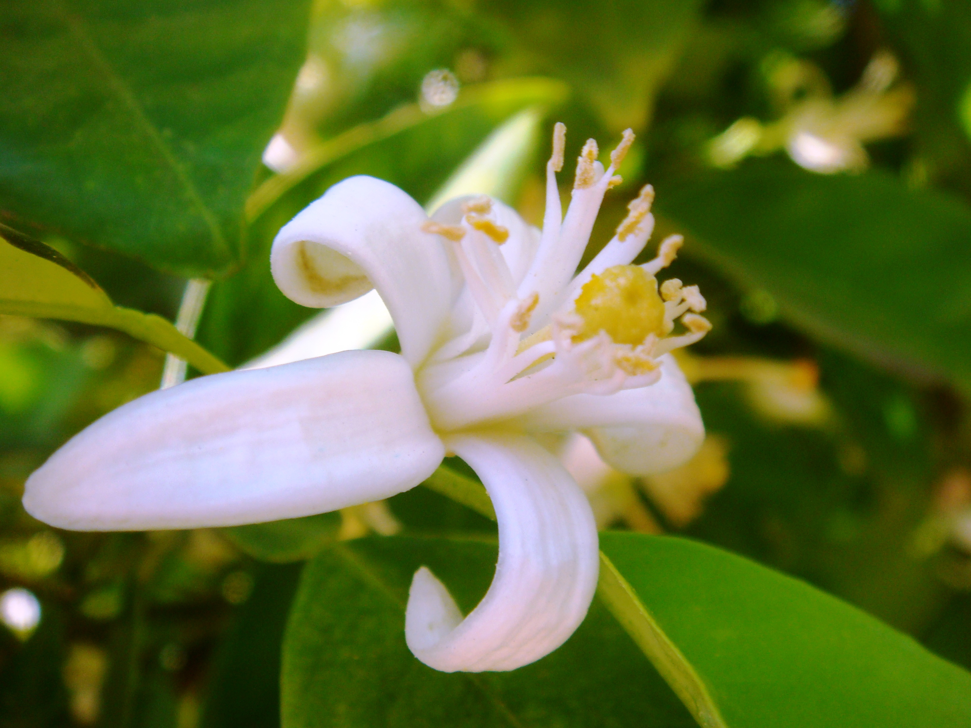 Citrus aurantium, cultivated, Tempe, Arizona